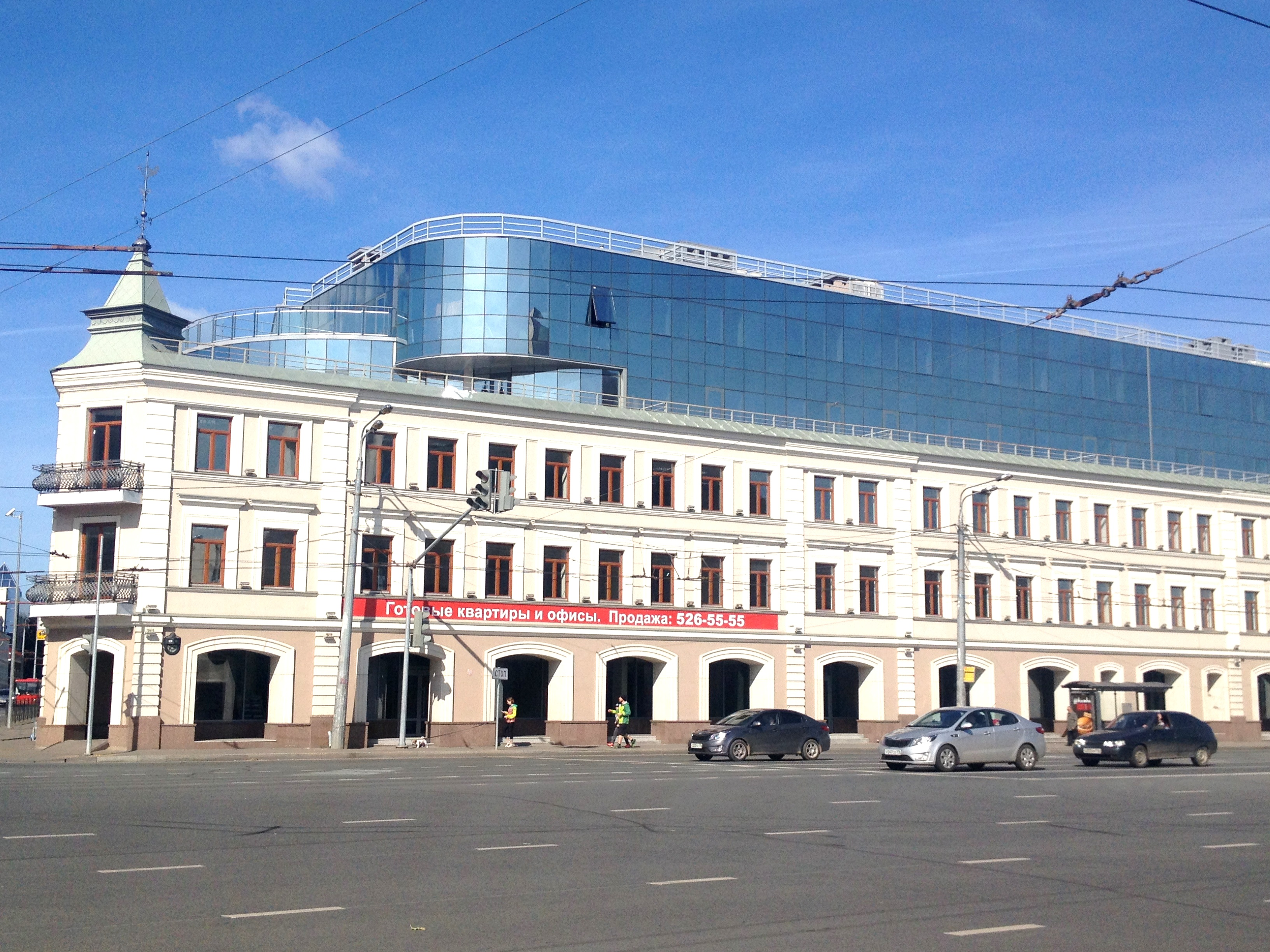 Дом, в котором жил поэт Габдулла Тукай: улица Татарстан, 14, кв.40, Казань, Татарстан